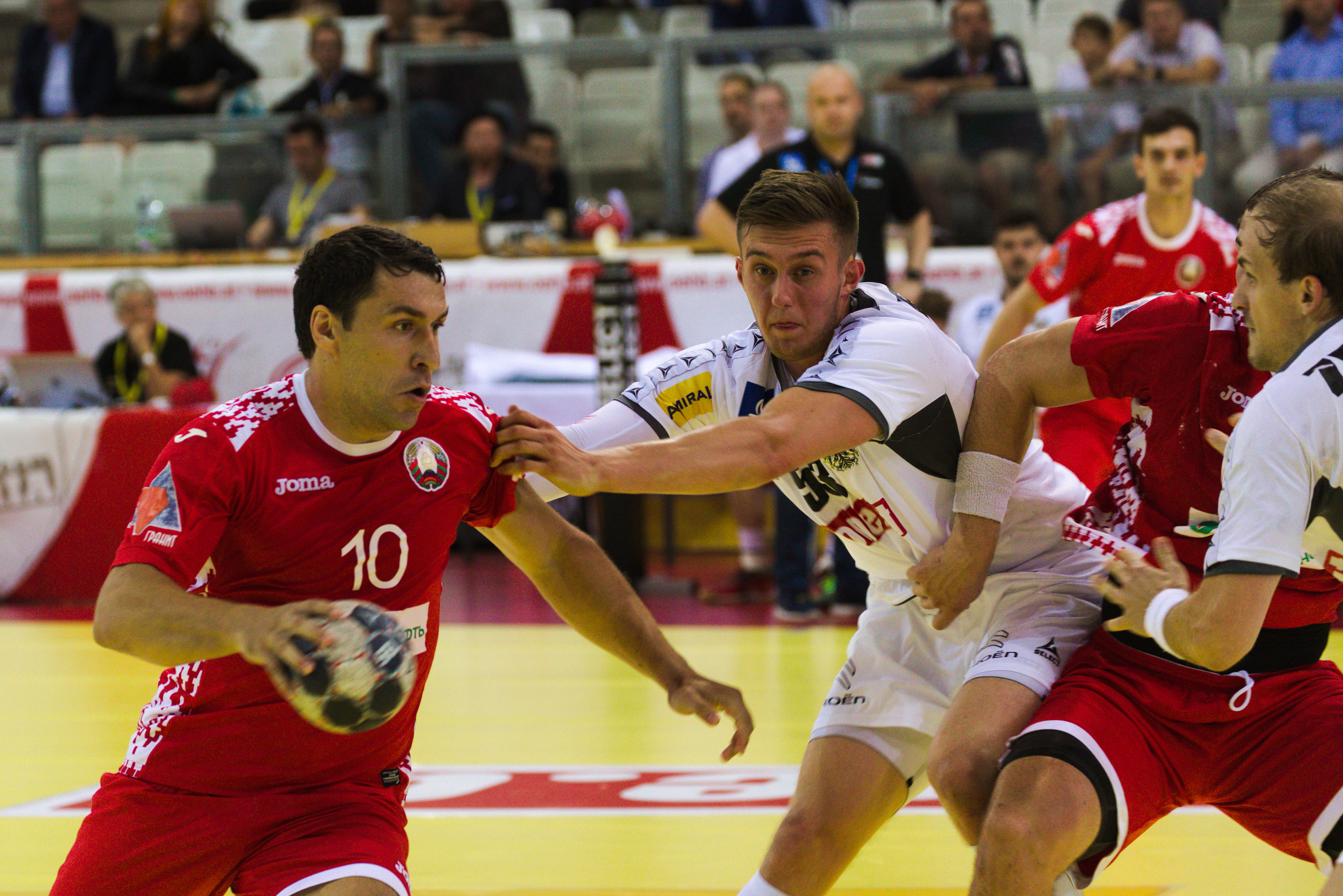 Handball-WM-Qualifikationsspiel zwischen Österreich und Weißrussland in Wien, 13. Juni 2018: Barys Puchouski (links) und Nikola Bilyk (Mitte)